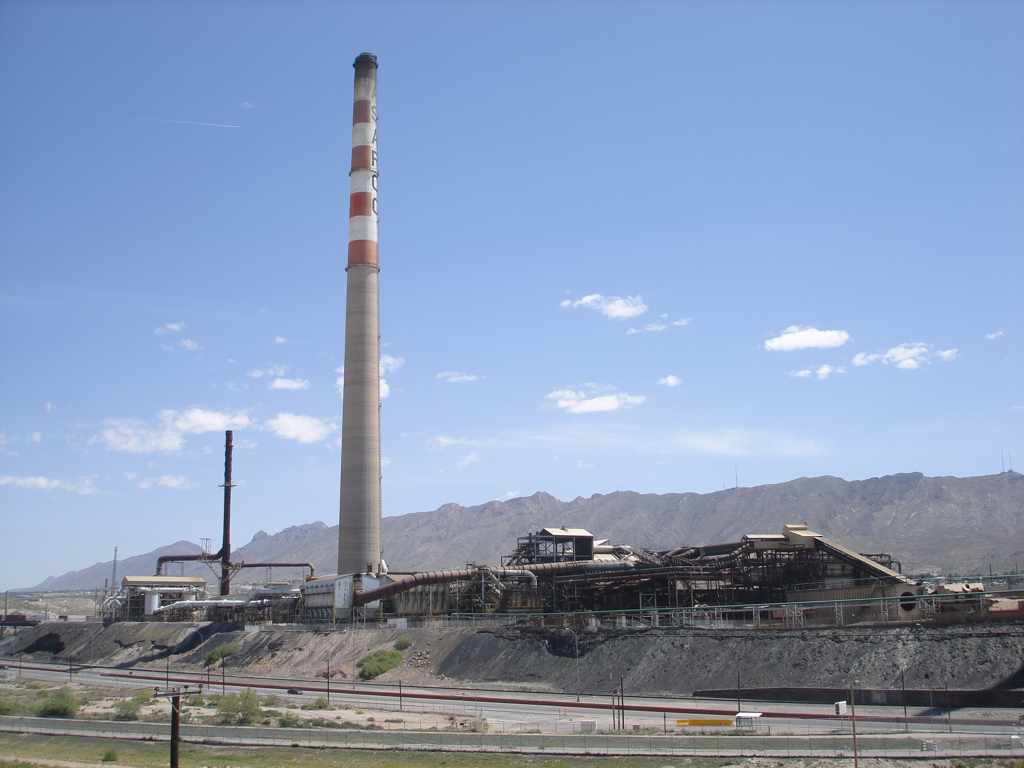 Fundidora Asarco en El Paso, Texas, en el límite fronterizo con Ciudad Juárez operó de 1887 a 1999